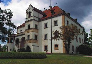 Schloss Friedenfels 2004 Foto: Harald Stark